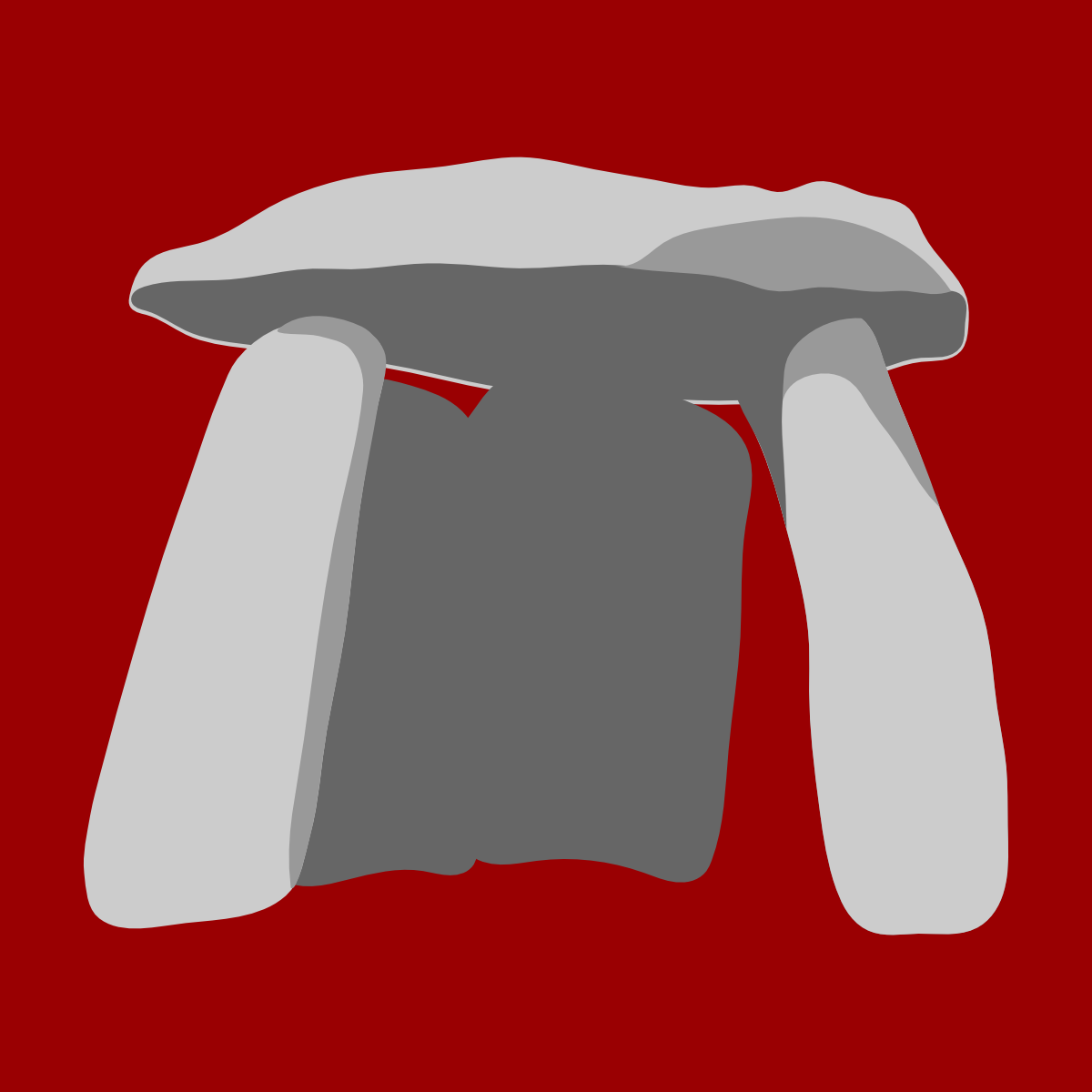 Logotipo baseado na Anta de Vilarinho de Castanheira, Carrazeda de Ansiães, Bragança, Douro, Portugal